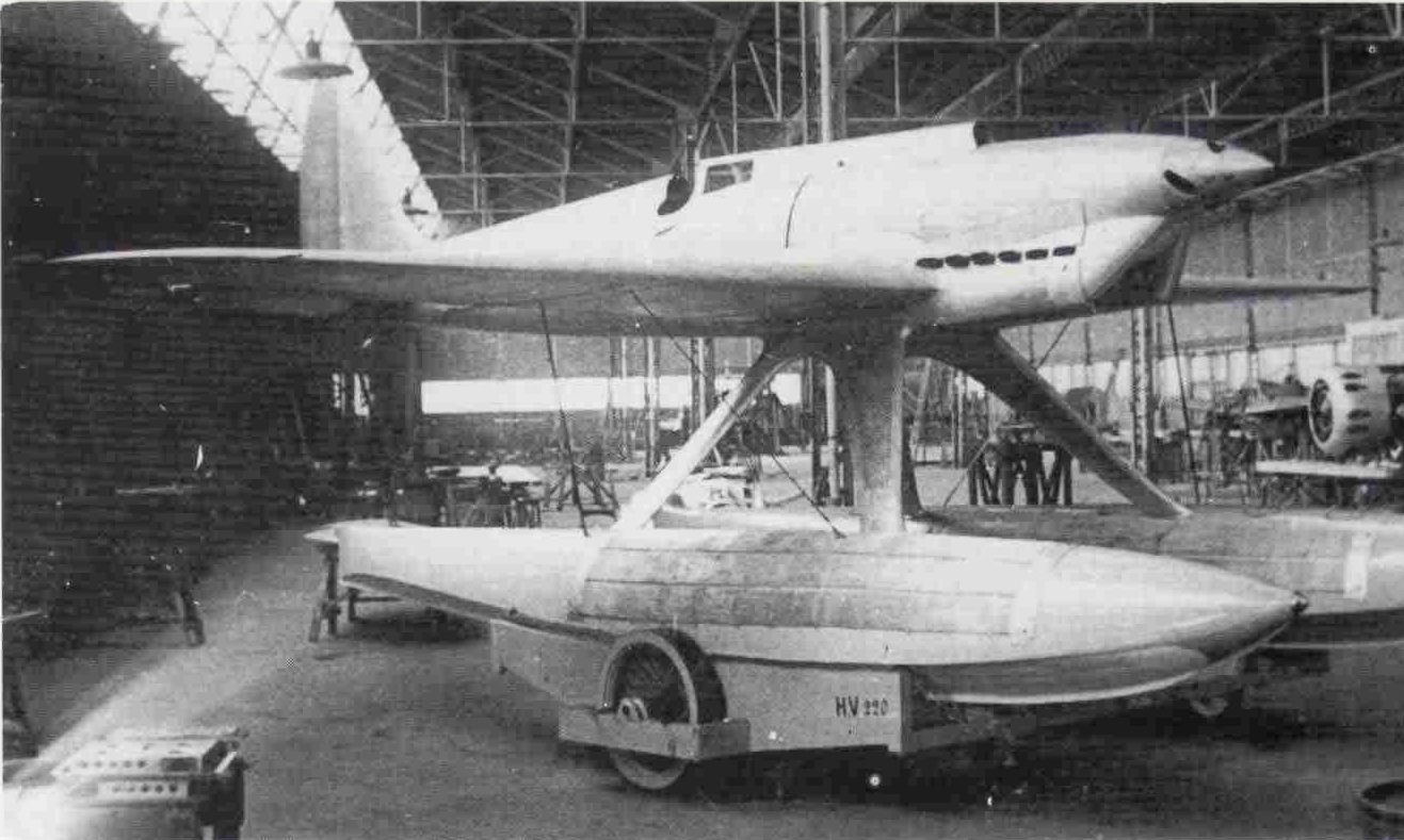 Bernard H.V.220 vue droite